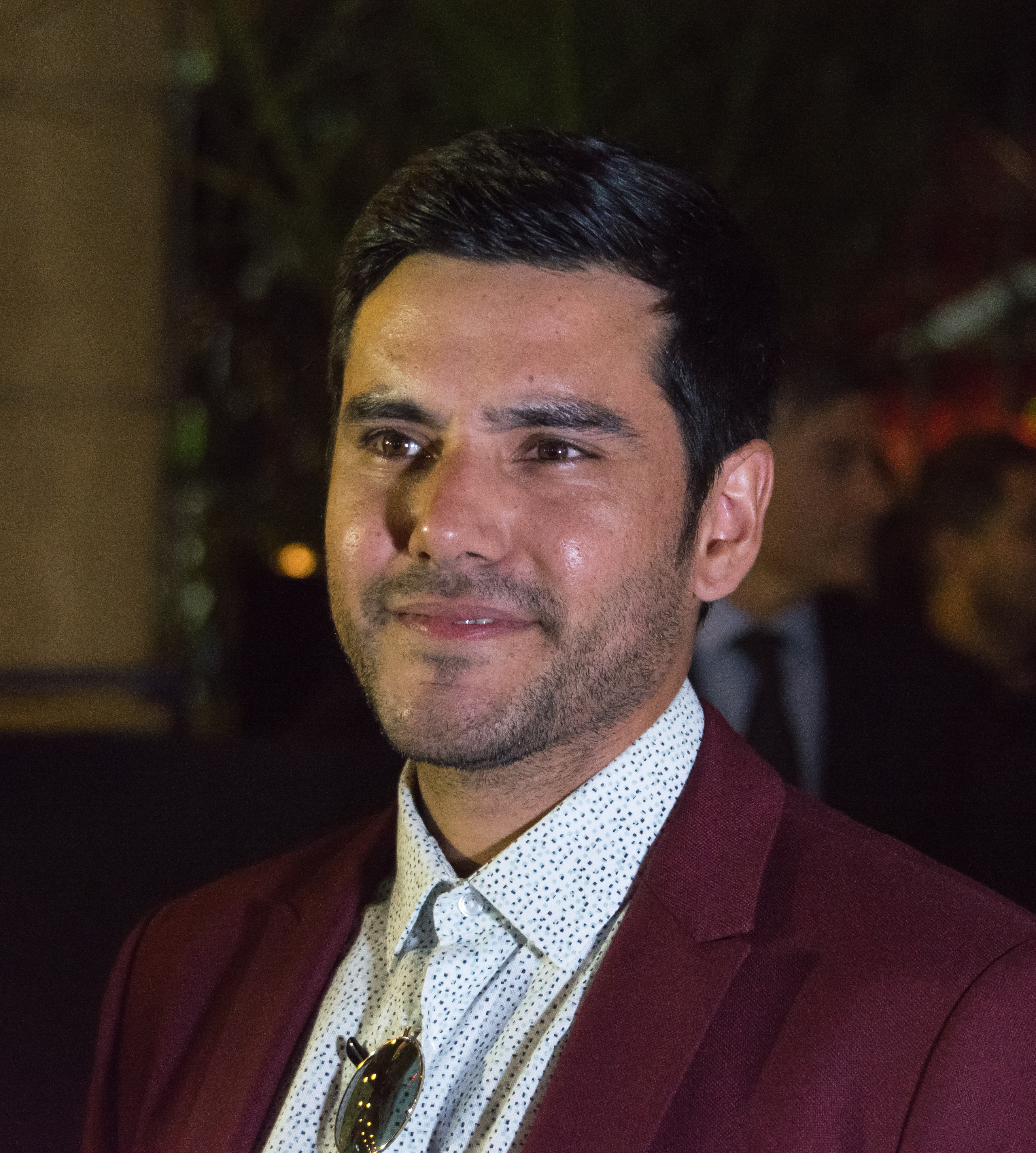 Ariel Mateluna, Premios Caleuche, Teatro Oriente, Providencia, Santiago, Región Metropolitana de Santiago, Chile.